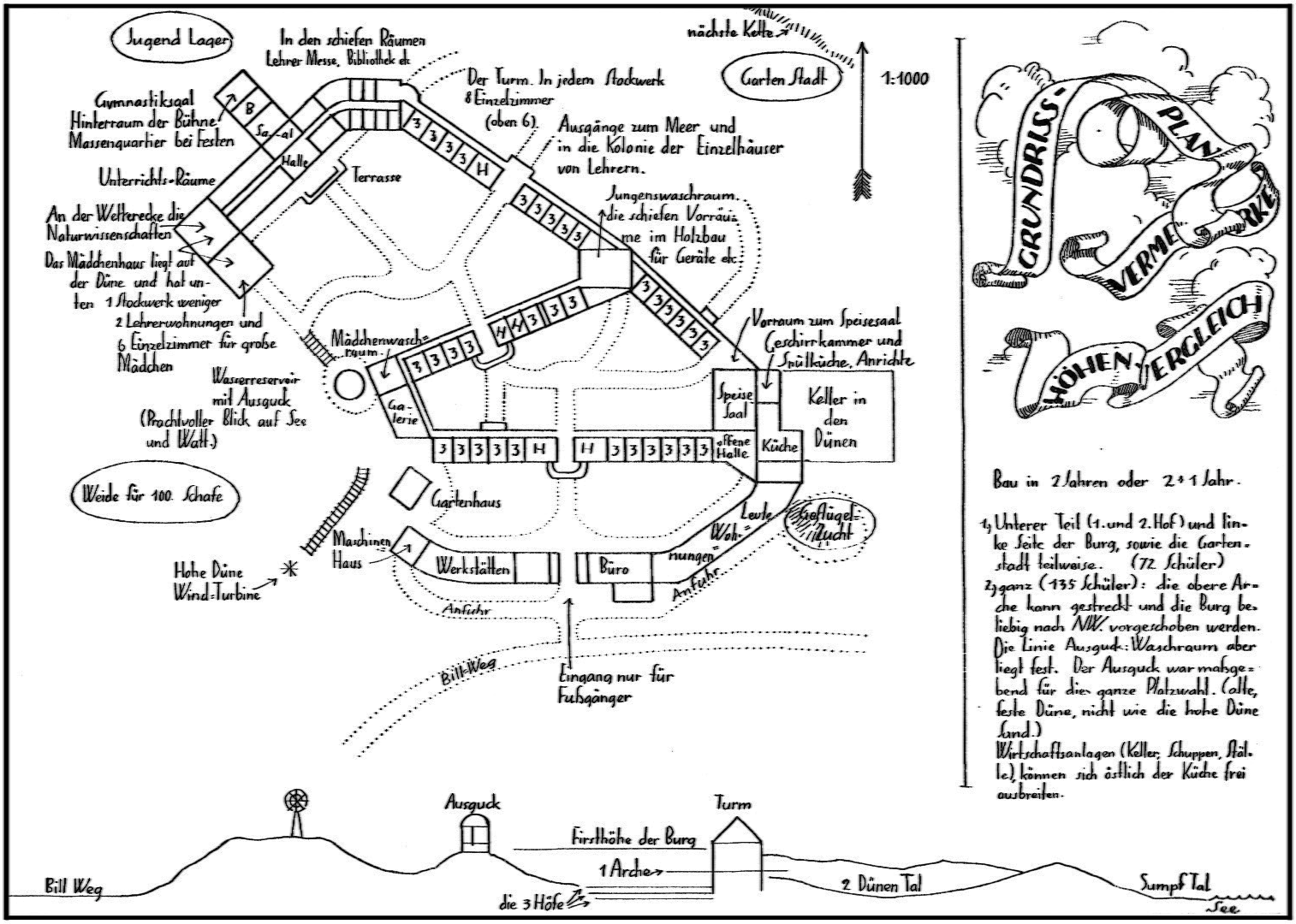 Zeichnung des Entwurfs eines Grundrisses für die geplante Schule am Meer auf der Nordseeinsel Juist (Ostfriesland) aus dem Jahr 1924. Ausgangspunkt der Planungen war lt. Schulgründer und -direktor Martin Luserke der als Ausguck auf Watt und Meer konzipierte Pavillon mit Kuppeldach auf dem höchsten Punkt einer die Schule überragenden Düne. Von den langen Gängen, die drei Innenhöfe bilden sollten, gingen die Wohnräume für einen großen Teil der Schüler ab.